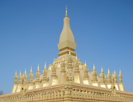 Pha That Luang,Laos